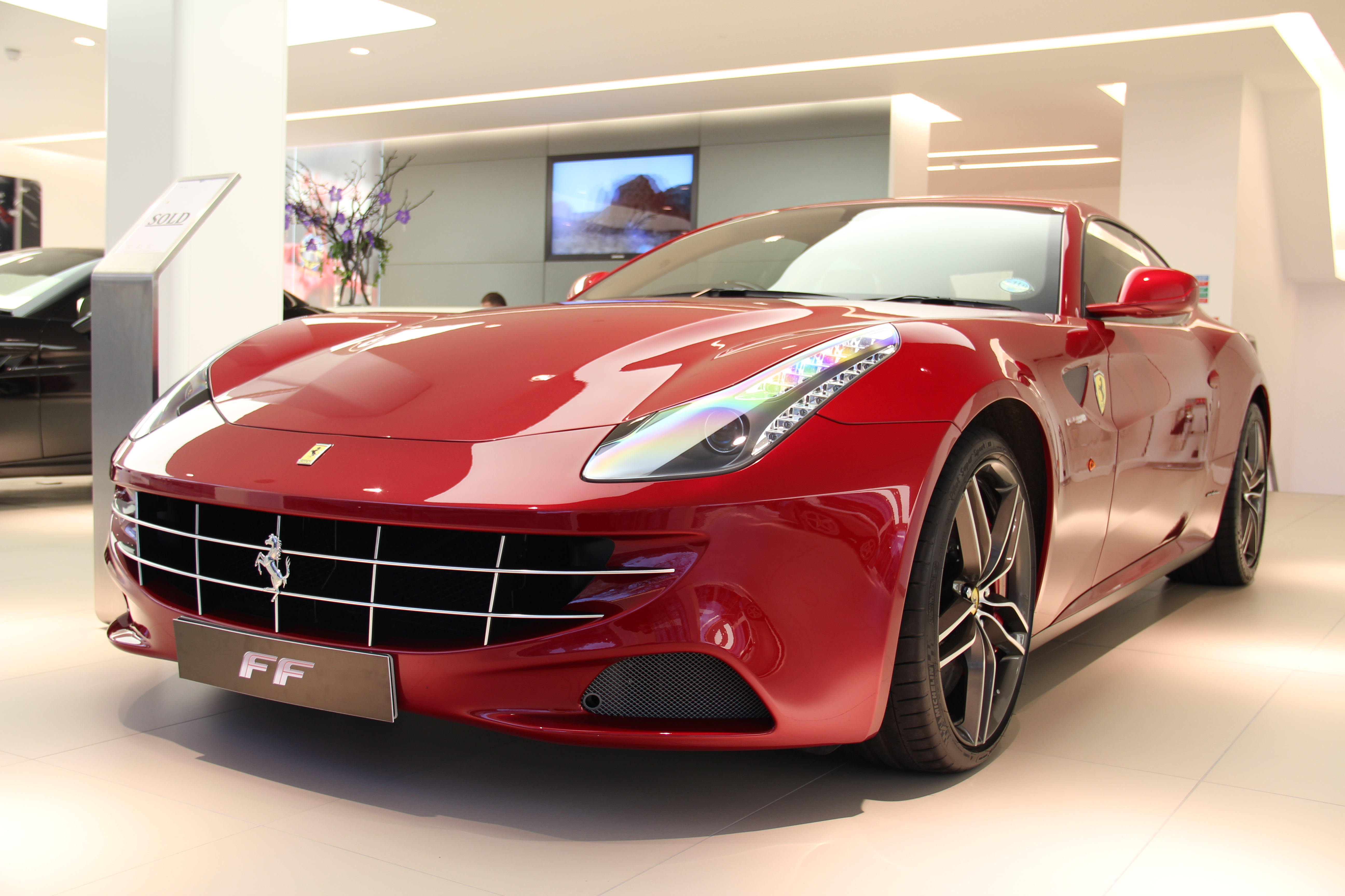 ferrari ff red